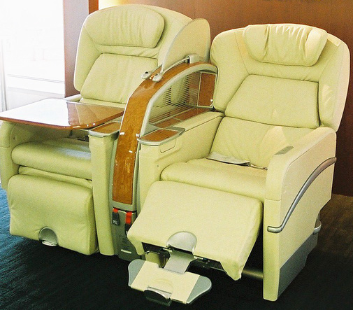 JAL 777 cabin